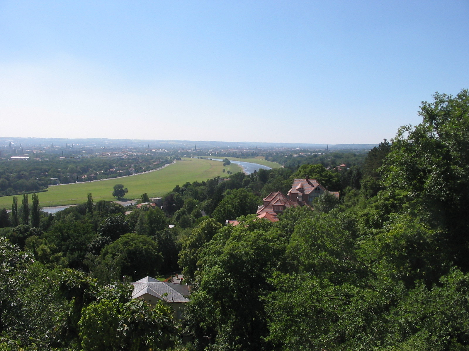 Das Elbtal und Dresden, fotografiert von der Terrasse des "Luisenhof" in Dresden Weißer Hirsch